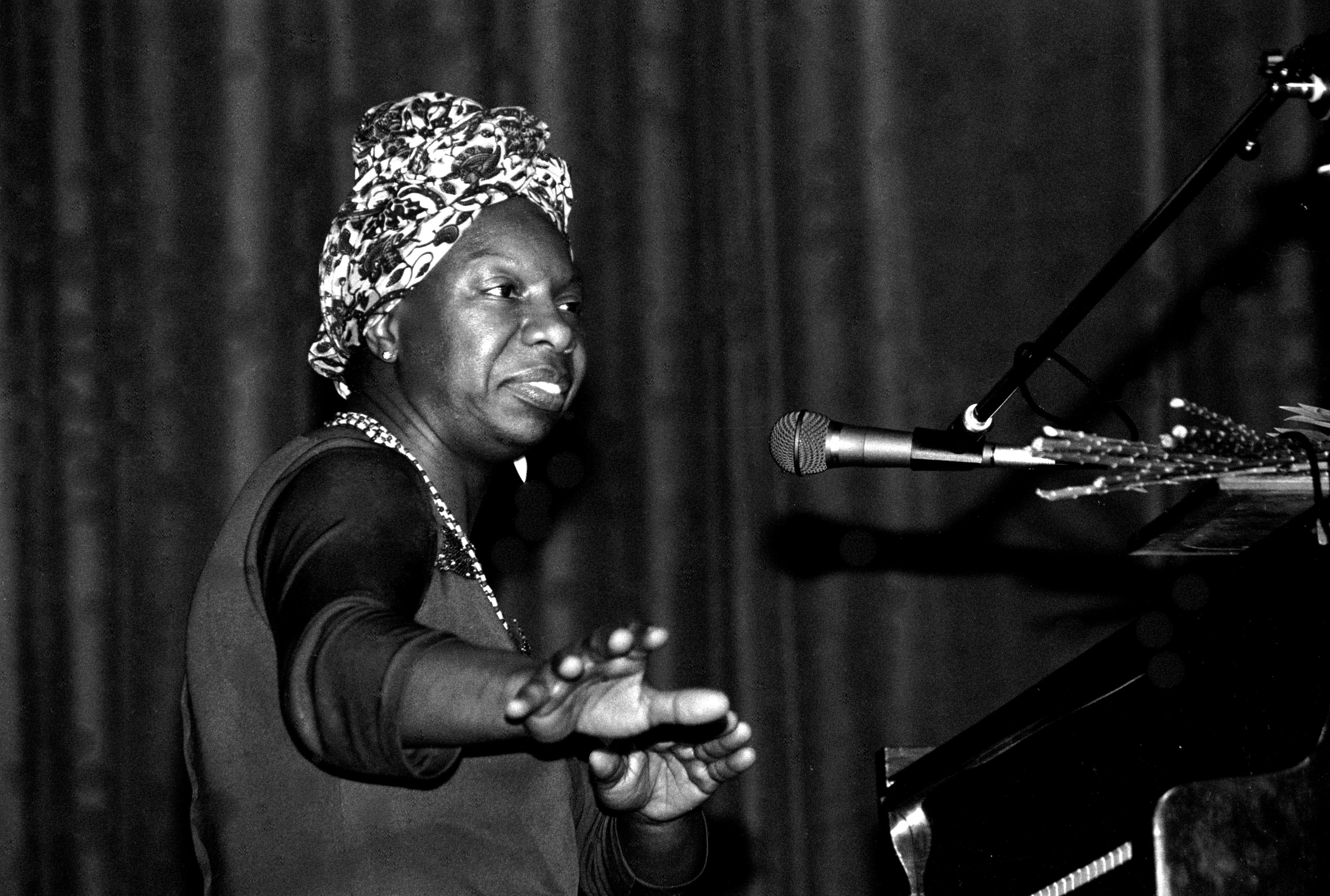 La chanteuse américaine Nina Simone en concert à Morlaix (Bretagne, France) en mai 1982.